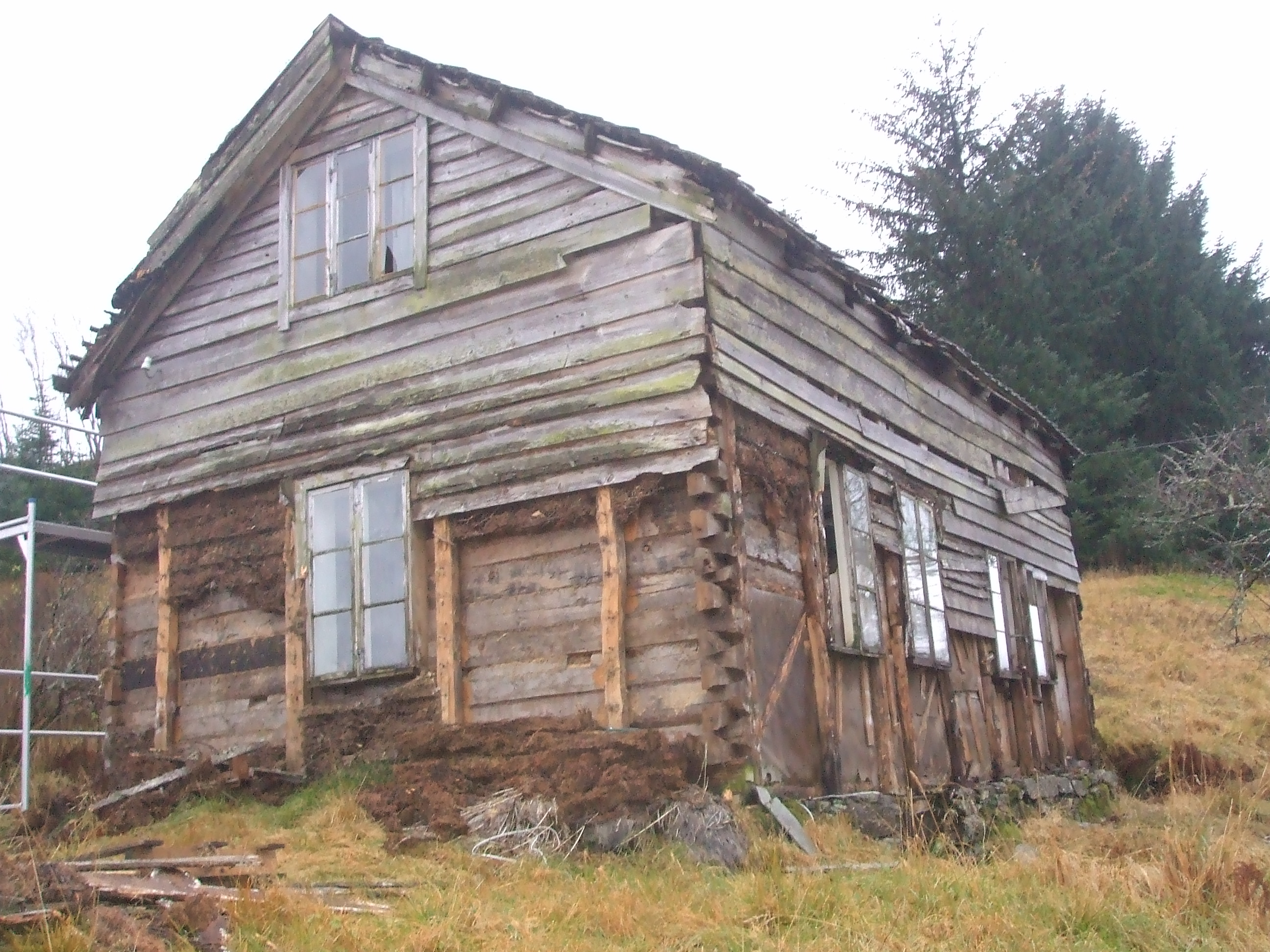 Log cabin in Norway. Isolert med torv. Bygning i klyngetunet Larsbakk i Fjaler, Sogn og Fjordane. Hentet hjem fra Hyllestad og gjenreist i 2008.